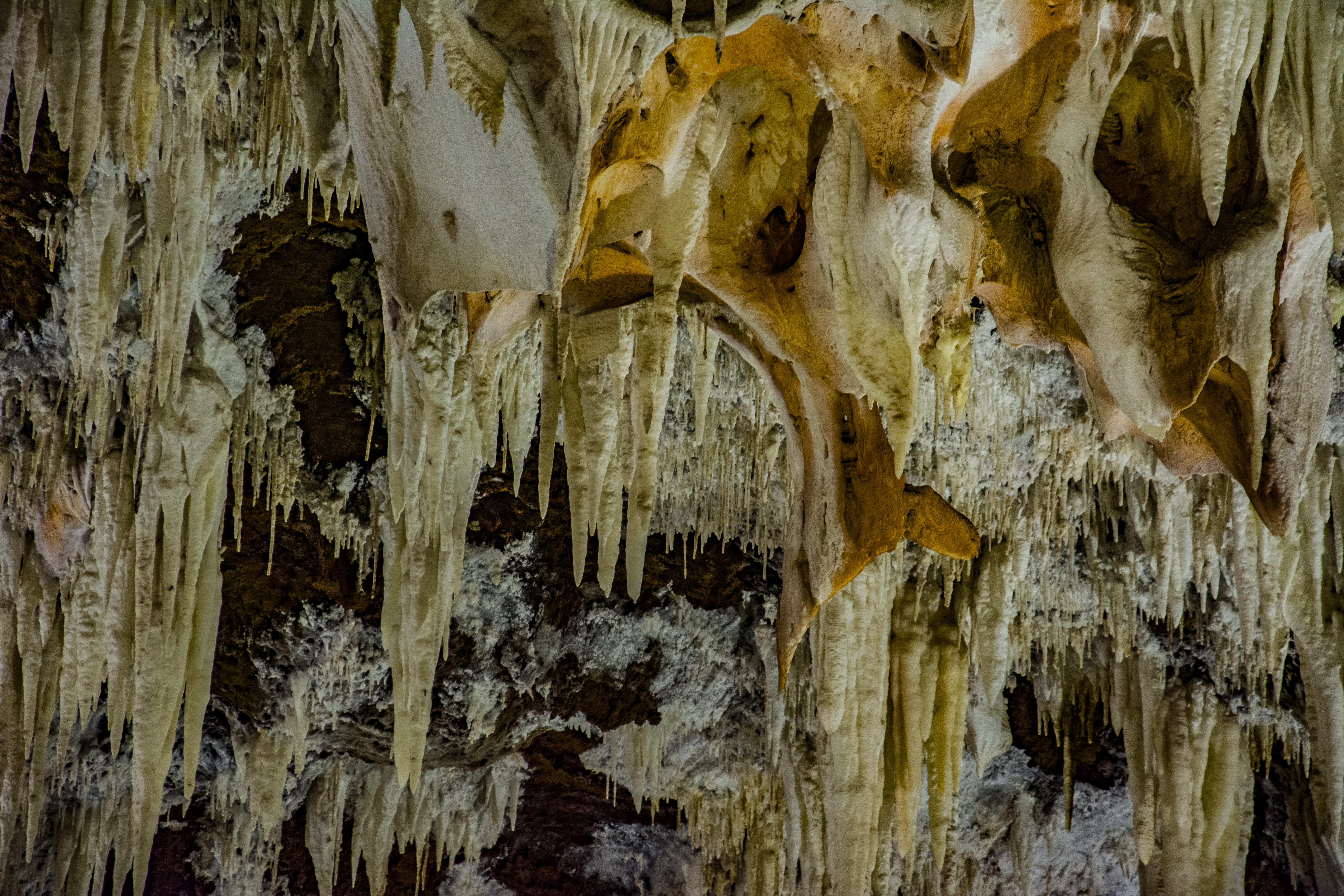 LIC ES4110115 - Valle del Tietar - Gruta del Aguila This is a photography of a Site of Community Importance in Spain with the ID: ES4110115. Natura2000 entry, EEA entry